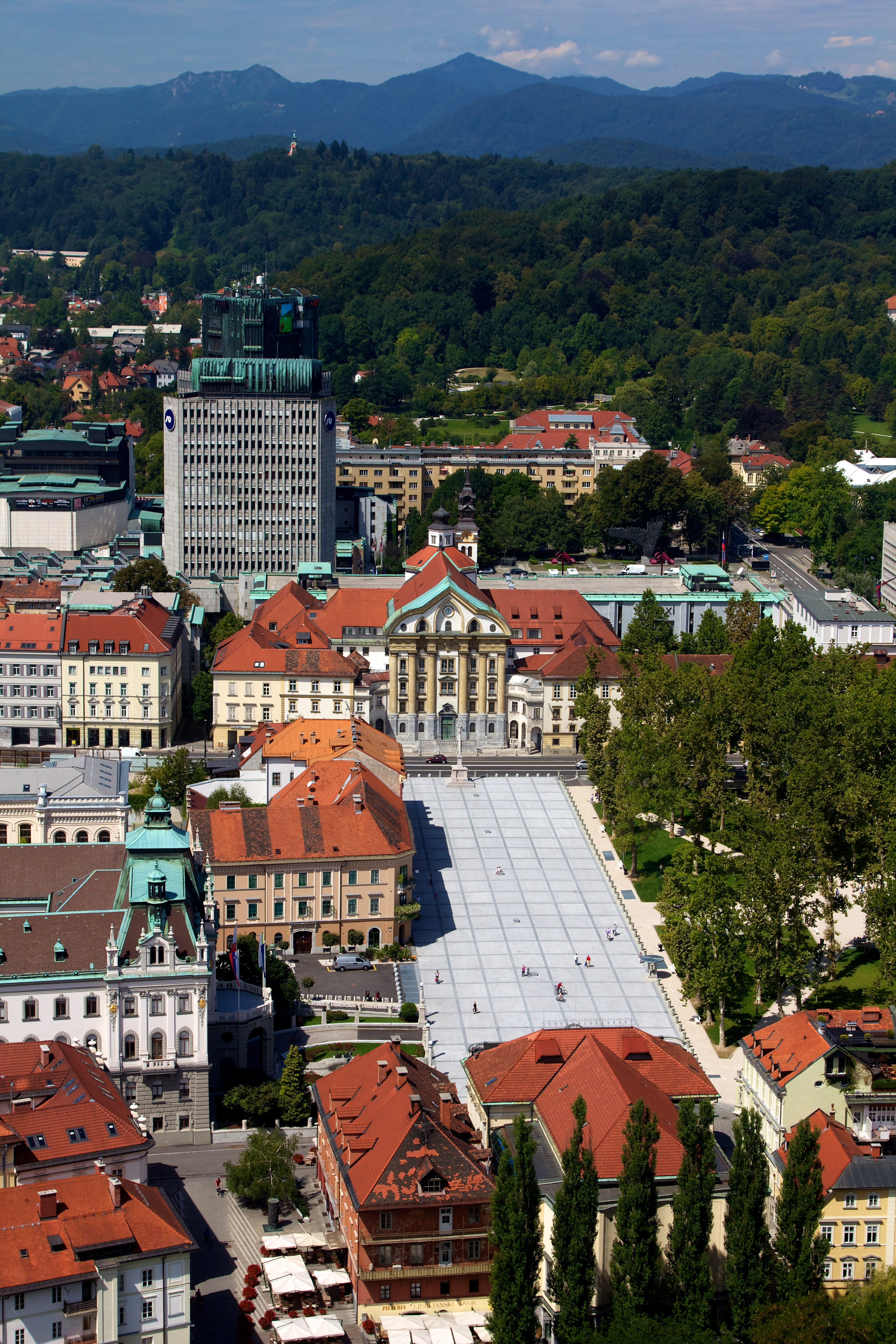 Plaza del congreso 002